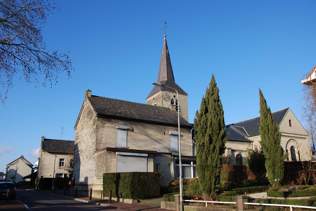 Limburgs: Sub, mergele kèrk